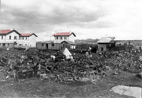 תחנת הרכבת בטול כרם. בתחנה נראים גזעי עצים שנכרתו והובאו לתחנה לצורך הסקת הקטרים.